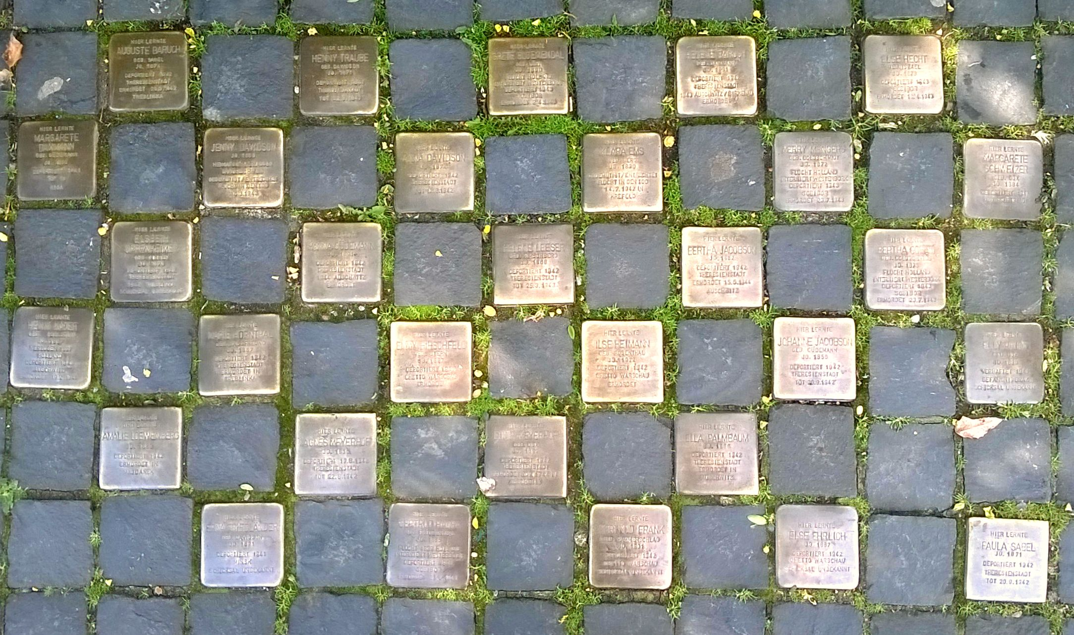 Stolpersteine vor dem Goethegymnasium in Hildesheim, Goslarsche Str. 65-66, weiterführende Info